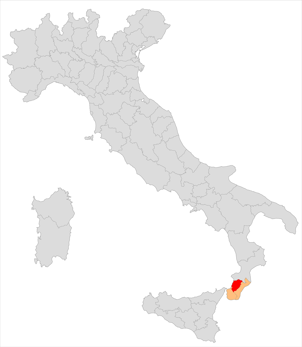 Il circondario di Palmi nella provincia di Reggio di Calabria (1860-1927)